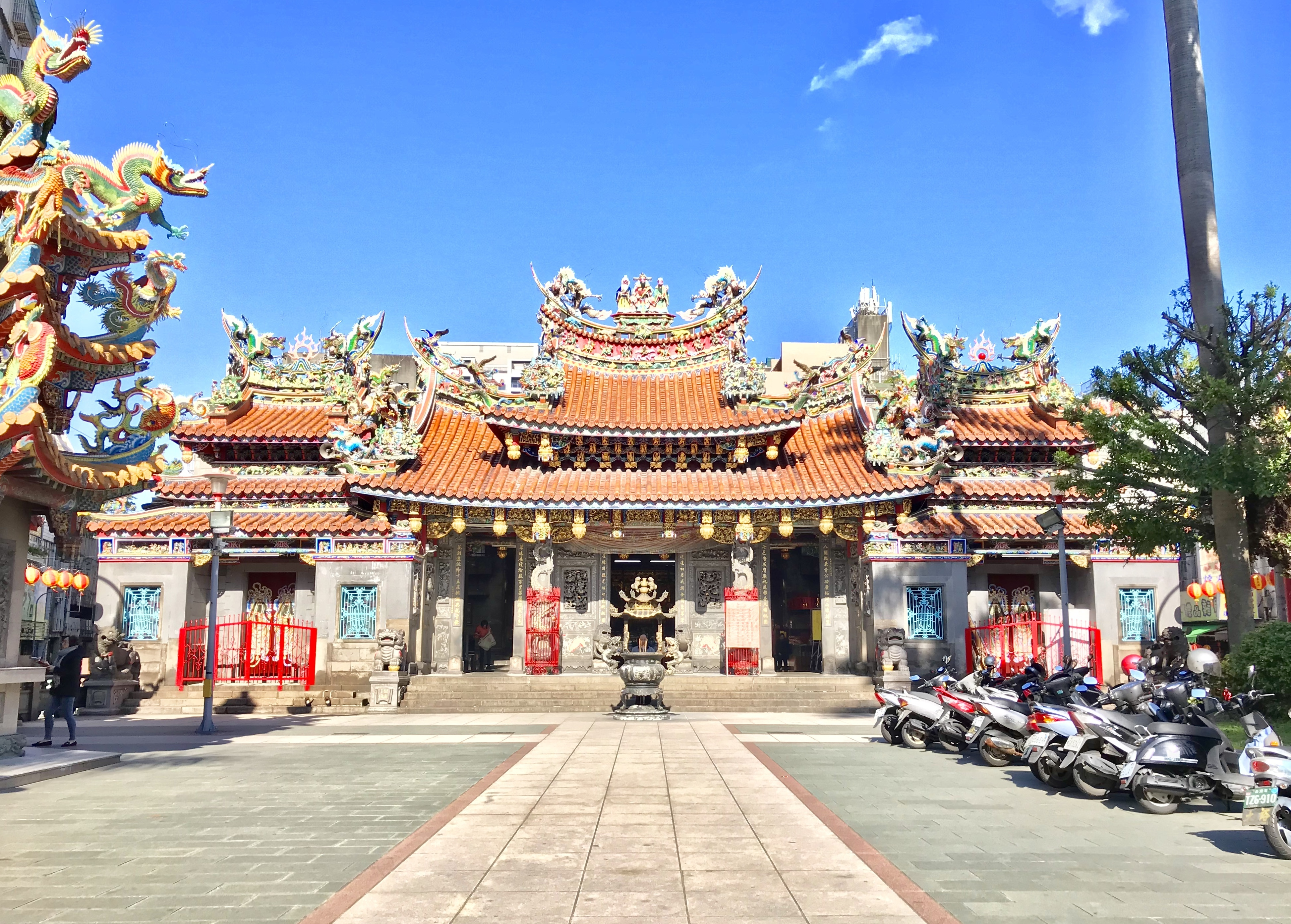 中文（台灣）: 桃園景福宮正面照